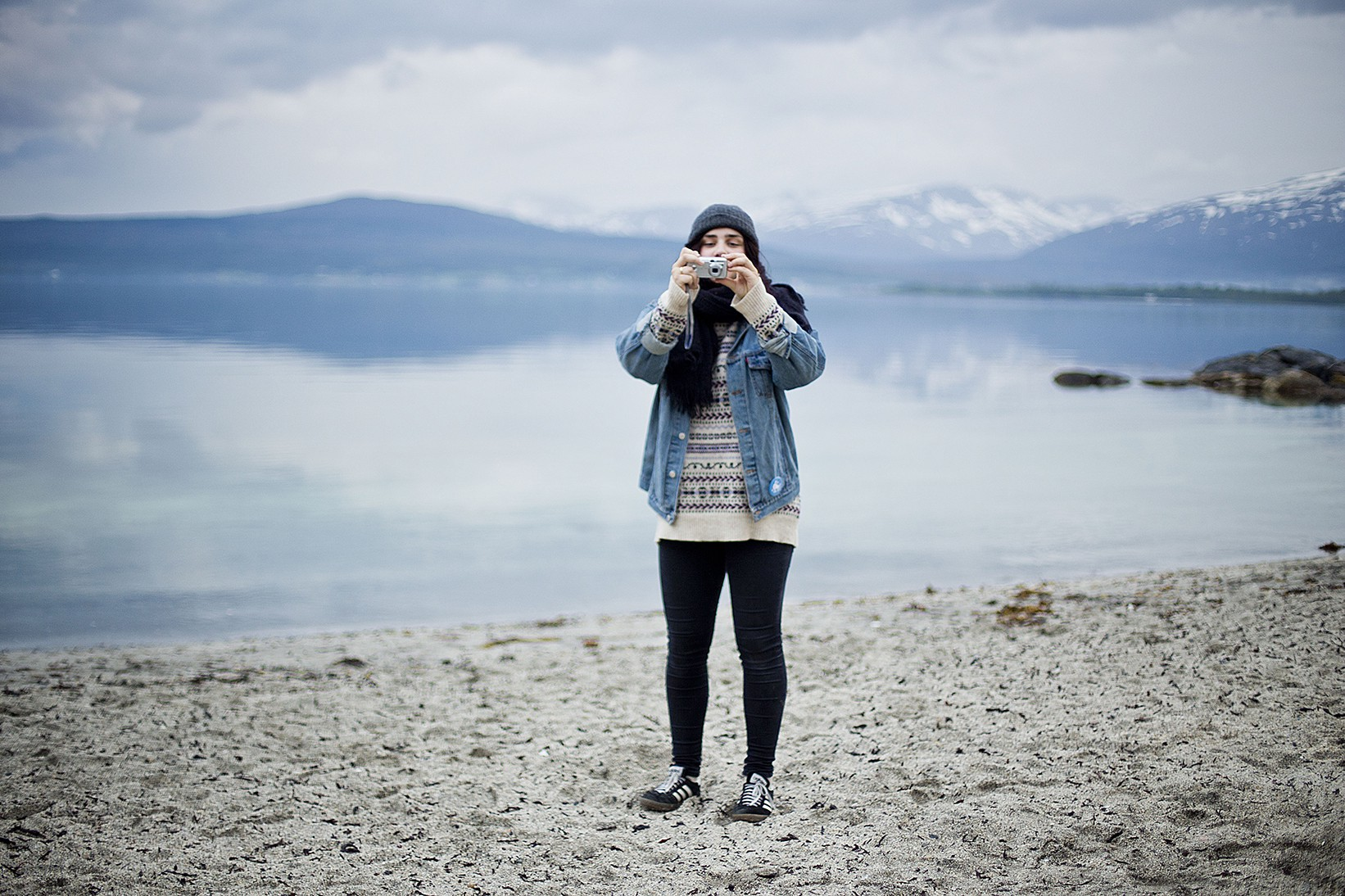 Andrea på Bukta i midnattsol under NUFF 2013